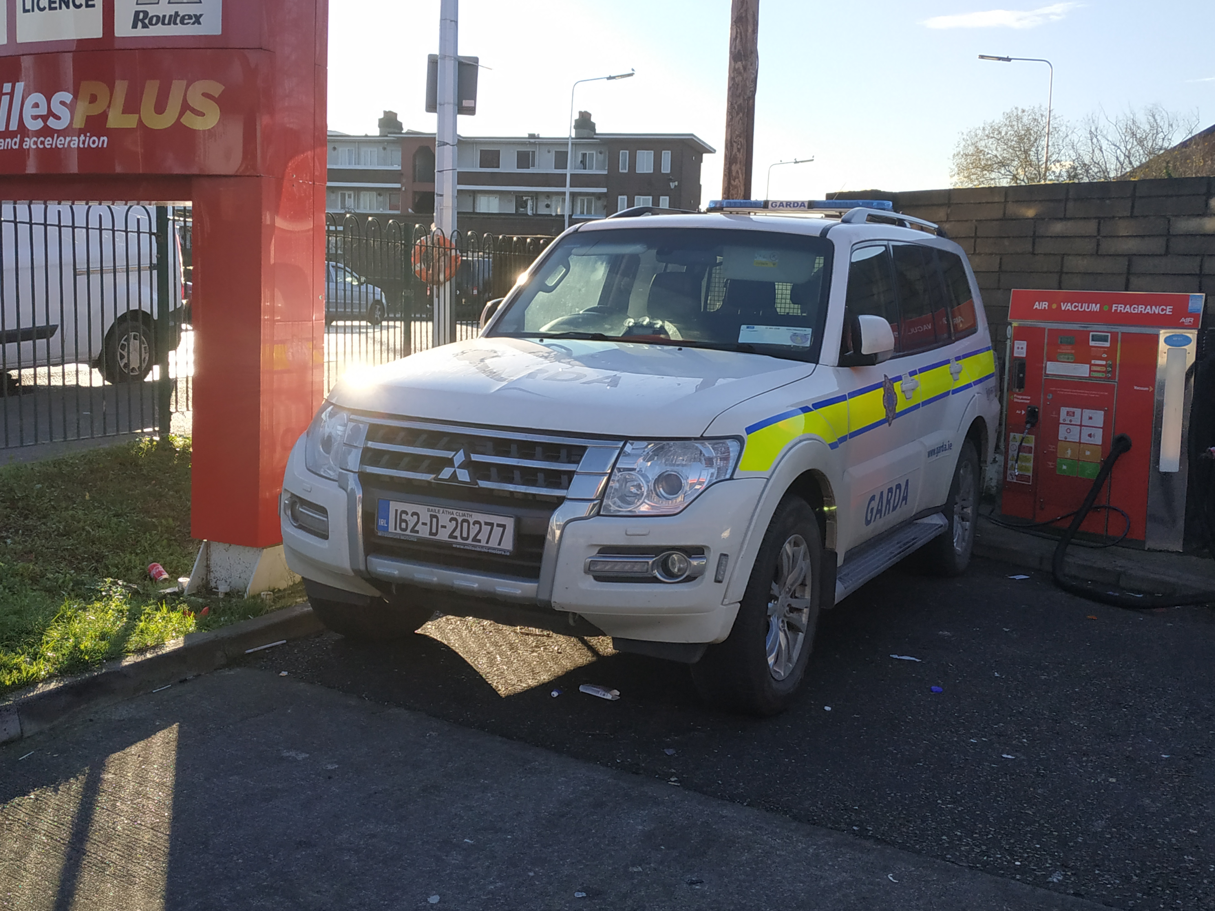 Mitsubishi Pajero de la Garda à Dublin en 2019